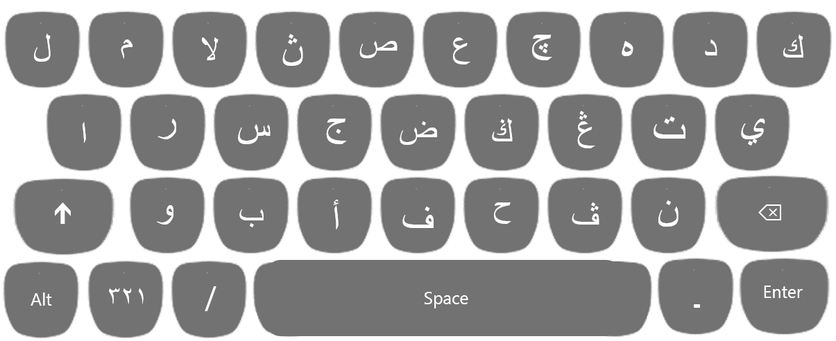 Susunatur papan kekunci aksara Jawi posisi hadapan mengikut susunan ergonomik